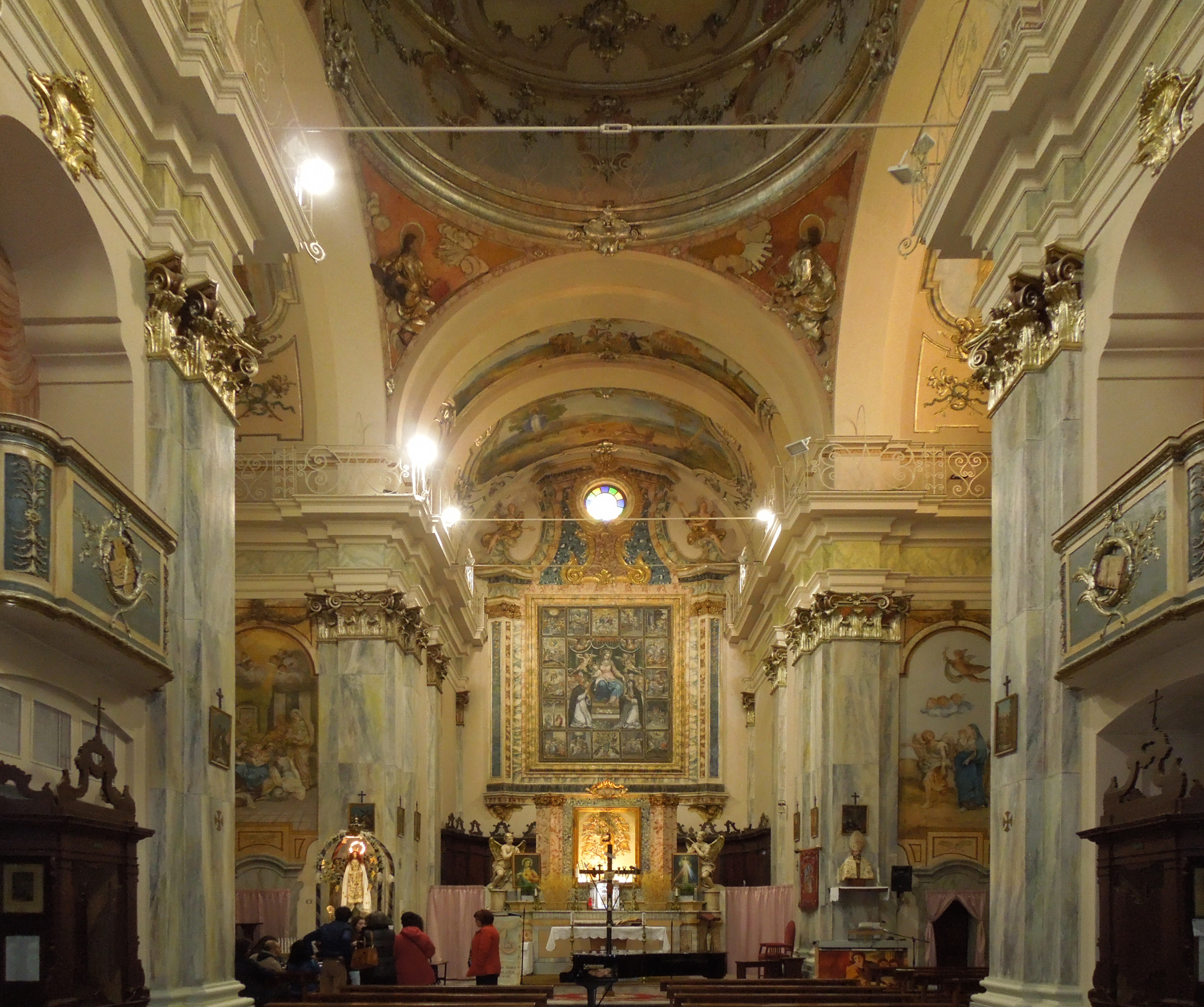 Aula liturgica del Santuario della Madonna dell'Alno di Canzano in provincia di Teramo. Un sentito ringraziamento al parroco di Canzano don Delfino Reggimenti che, accordandomi il permesso, ha consentito lo scatto di questa immagine.